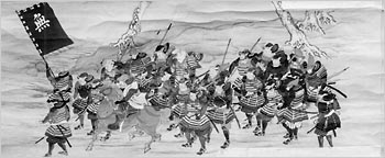 「道樹･宗智両祖出陣之図」第8 豊臣秀吉が北条氏攻撃にのぞむ将兵を閲兵したおりの仙石秀久主従の姿。